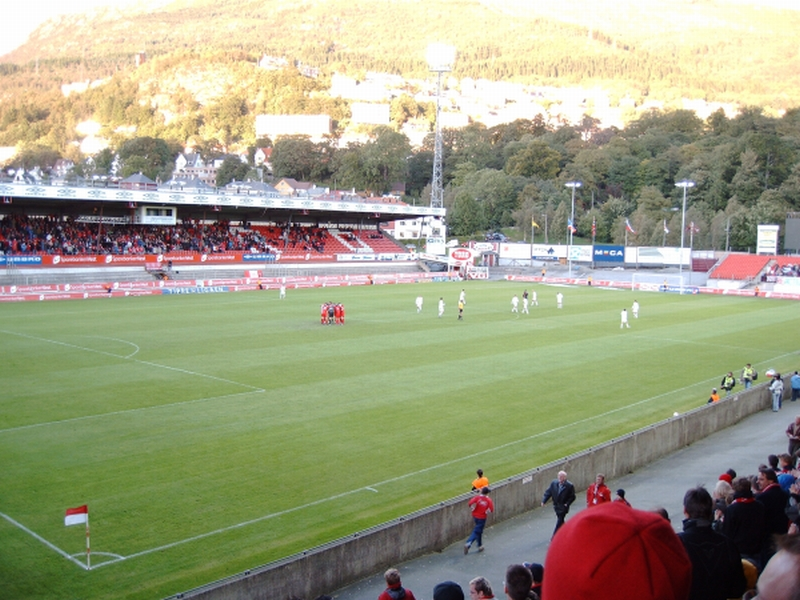 Kurz vor Anpfiff: Erste Runde UEFA-Cup, Brann Bergen (rot) gegen Lokomotive Moskau (weiss). 15. September 2005, Brann-Stadion, Bergen. Endstand: 1:2 (1:0) [Rückspiel: 2:3]